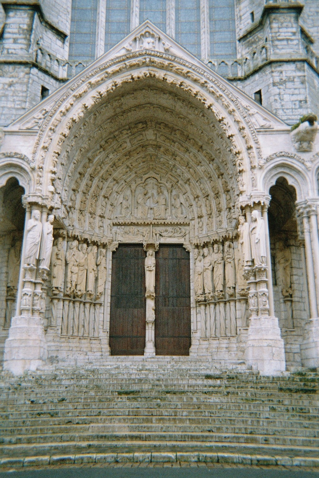 Porche central nord de la Cathédrale de Chartres